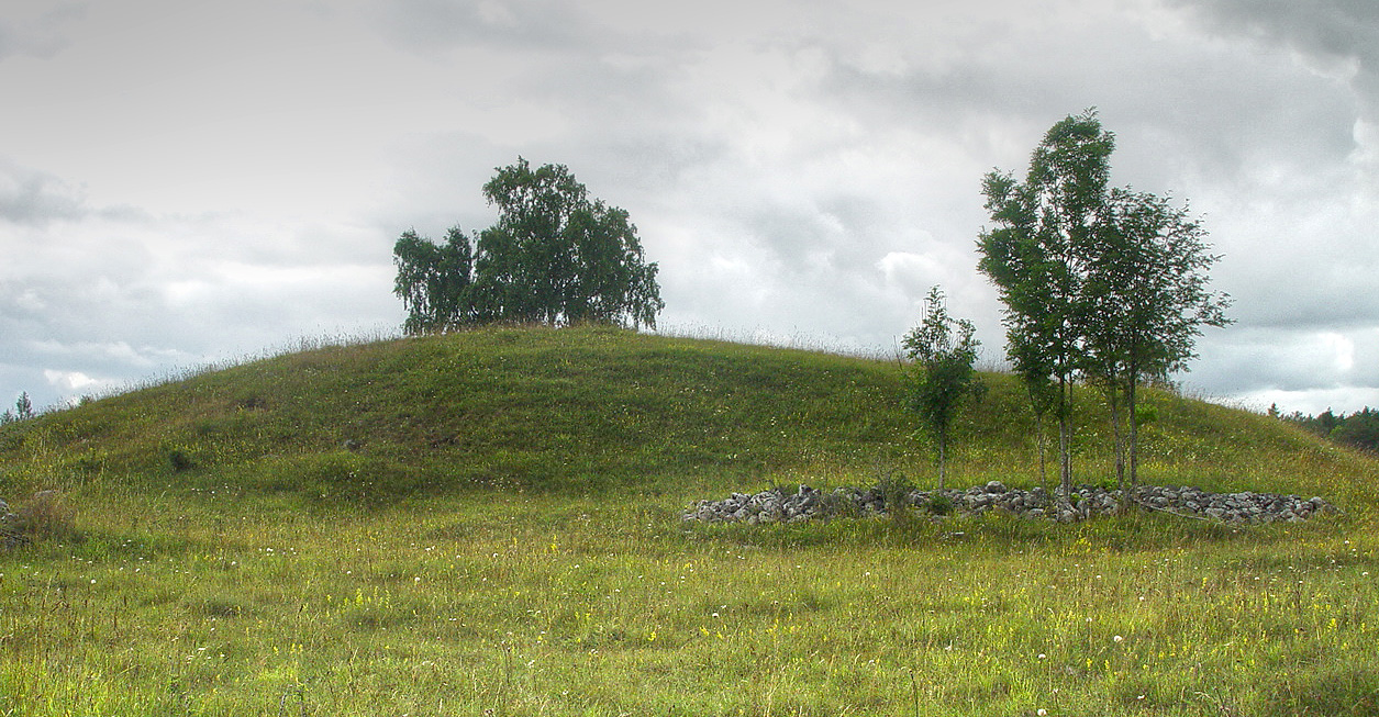 Gotland, Grabhügel Bjär. Durchmesser 55m, Höhe 6m. Wahrscheinlich frühe Bronzezeit (1500-1000 v.Chr.)